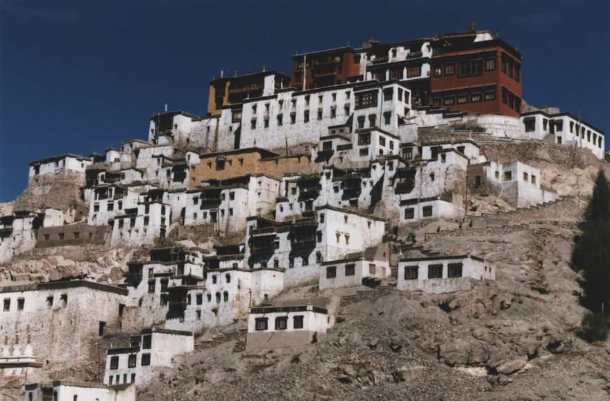 Tikse monastery in Ladakh, India